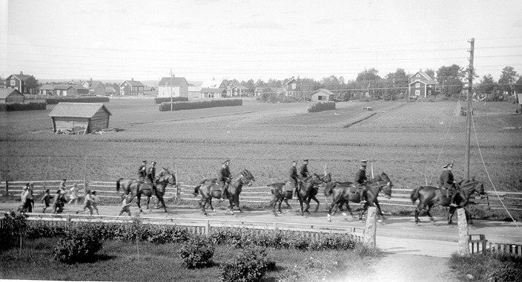 I juli 1932 tillkallades "kravallpolis" söderifrån i samband med att strejker utbrutit på flera håll under våren, bl a i Klemensnäs. Polisens uppgift var att skydda de strejkbrytare som Scharins anställt, något som ledde till öppna konfrontationer mellan arbetare och strejkbrytarna. Många skadades på båda sidor under bråken. Birger tog bilden västerut från övervåningen i Lars Anton Bäckmans hus. På lägdorna bortom den nuvarande Scharinsvägen byggdes senare nytt kontor (1944) och brukshotell/tjänstemannamäss (1947).